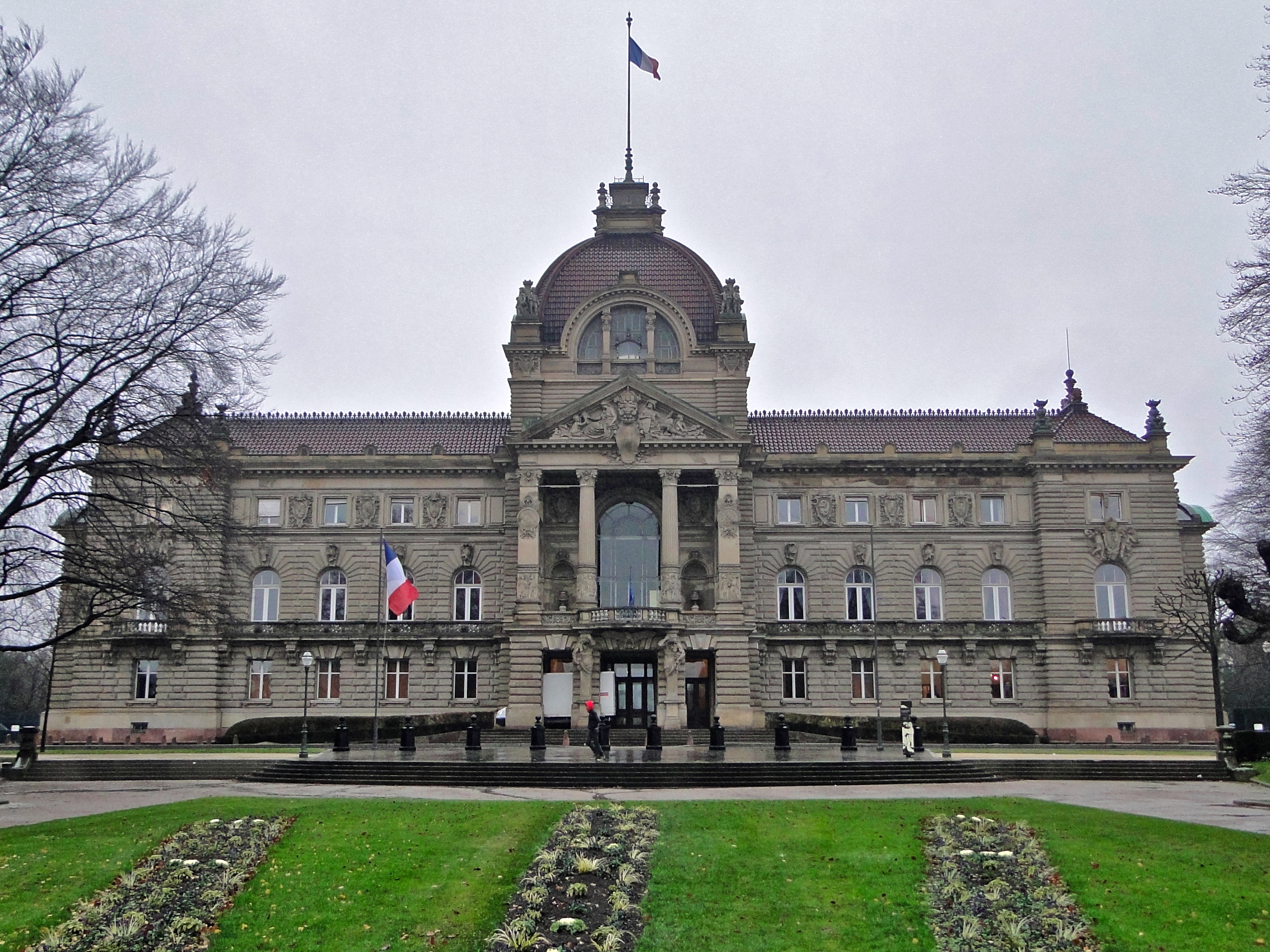 Caractéristiques Ville : Strasbourg (67000) Quartier : Quartier Allemand Adresse: place de la République Livraison : 1889 Style : Néo-renaissance Fonction : Autre Architecte : Hermann Eggert Données techniques Niveaux : R+3 Hauteur : ±28.00 m